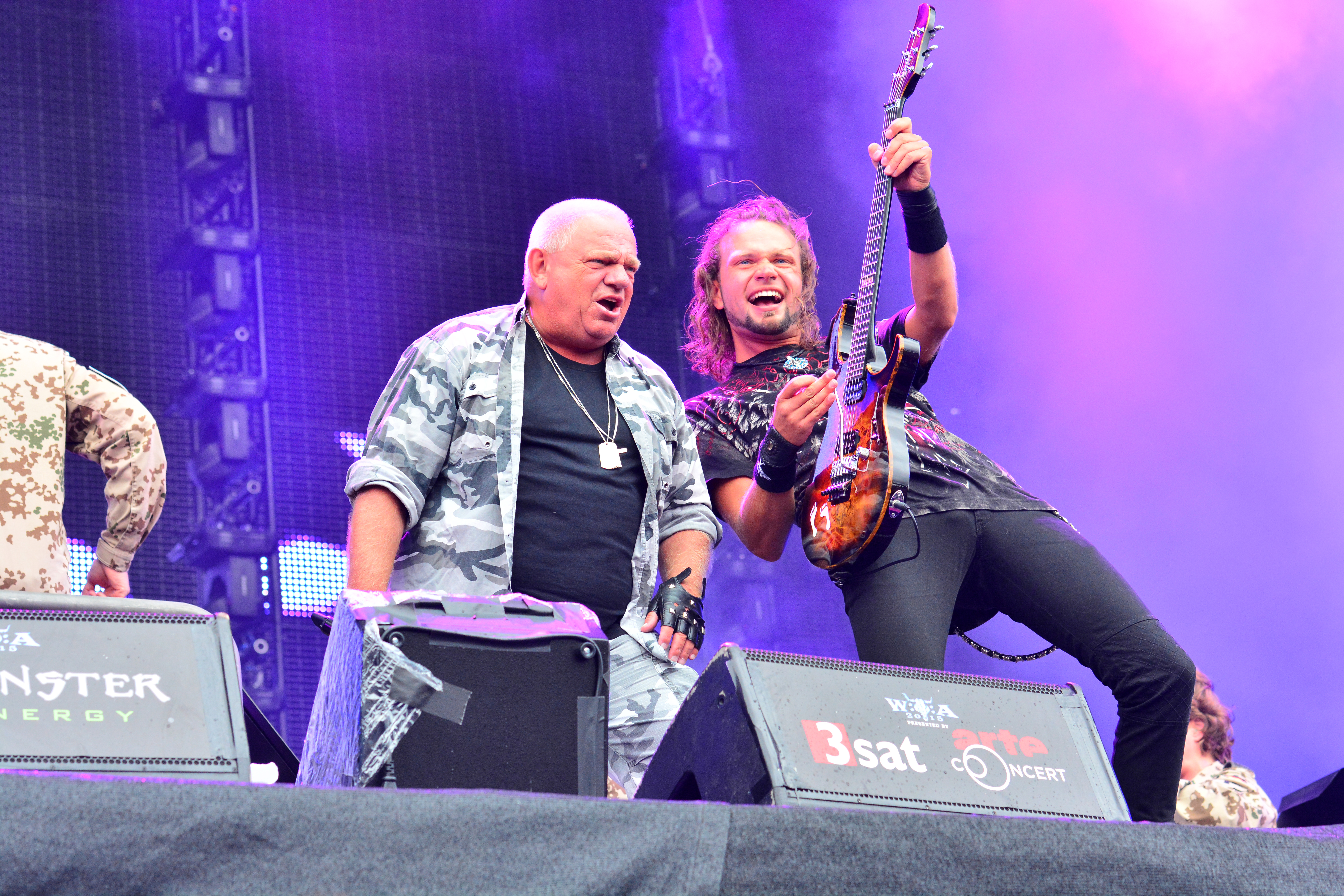 U.D.O. beim Wacken Open Air 2015